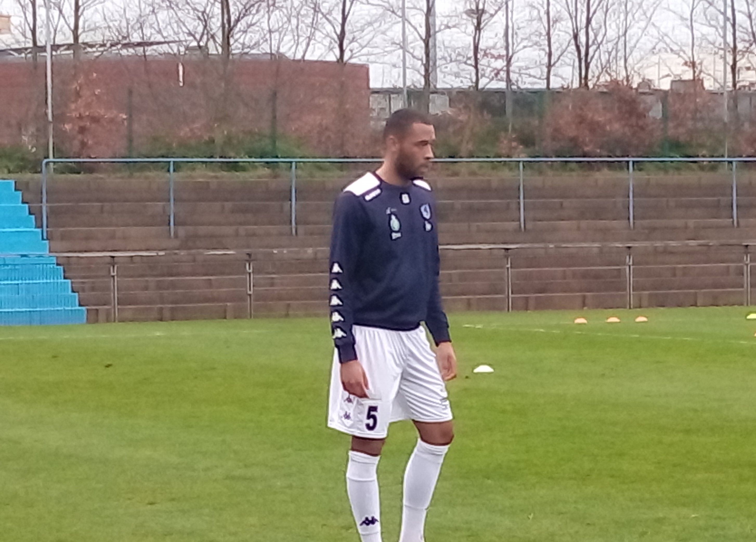 Martin Ekani avant le match Lens B / Drancy, comptant pour la vingt-et-unième journée du championnat de France amateur de football, le 4 mars 2017, au Stade François-Blin d'Avion.